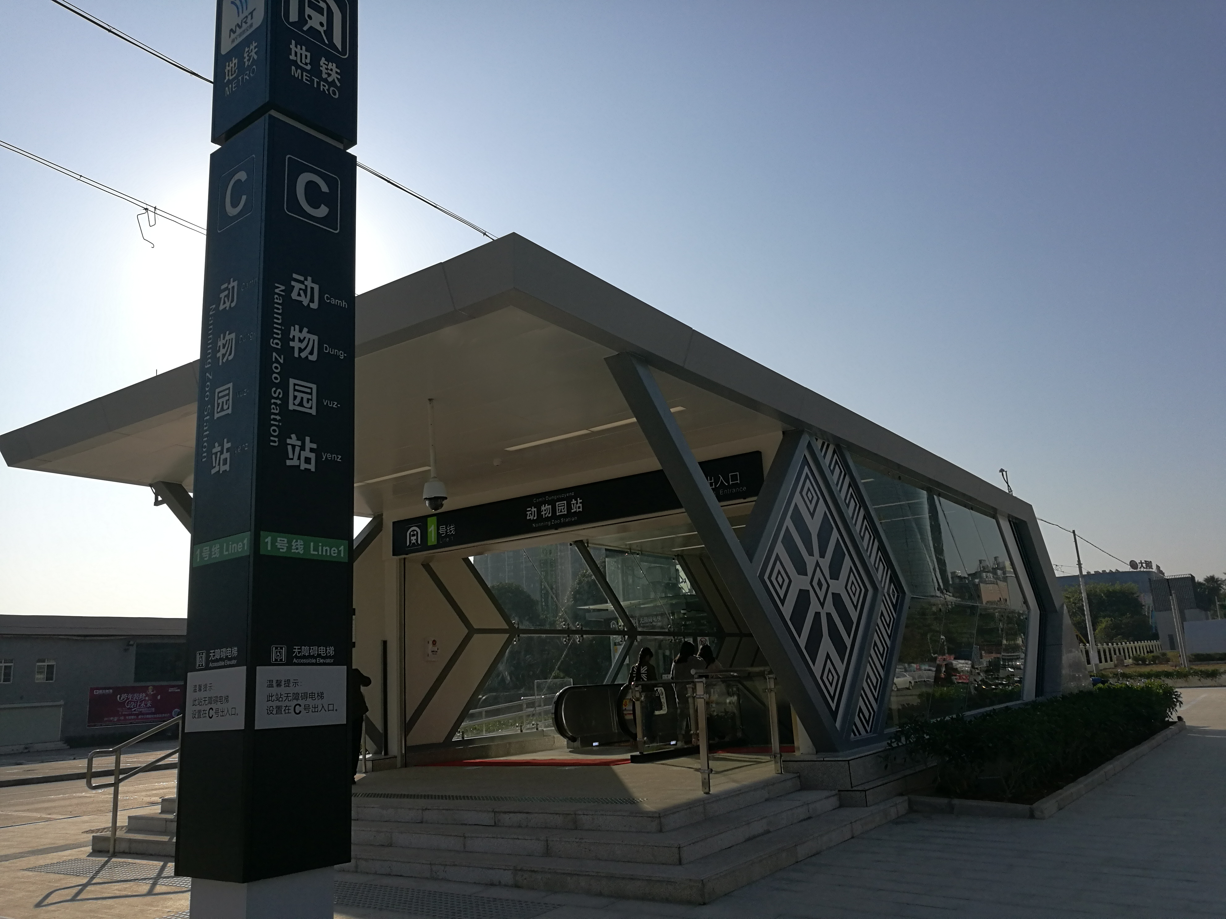 南宁轨道交通动物园站